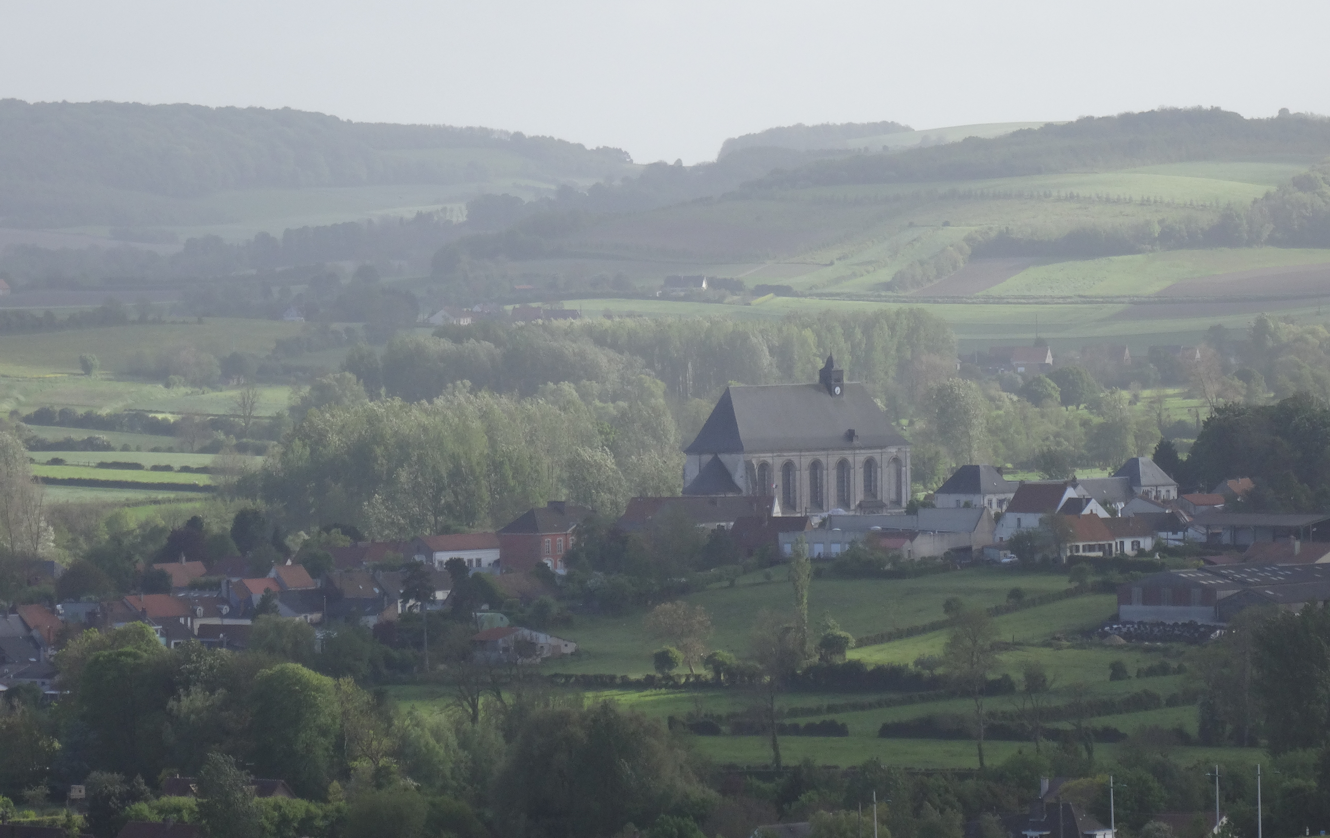 Reportage photographique réalisé le samedi 10 mai 2014 à l'arrivée de la quatrième étape de l'édition 2014 des Quatre jours de Dunkerque à Licques, Pas-de-Calais, Nord-Pas-de-Calais, France.